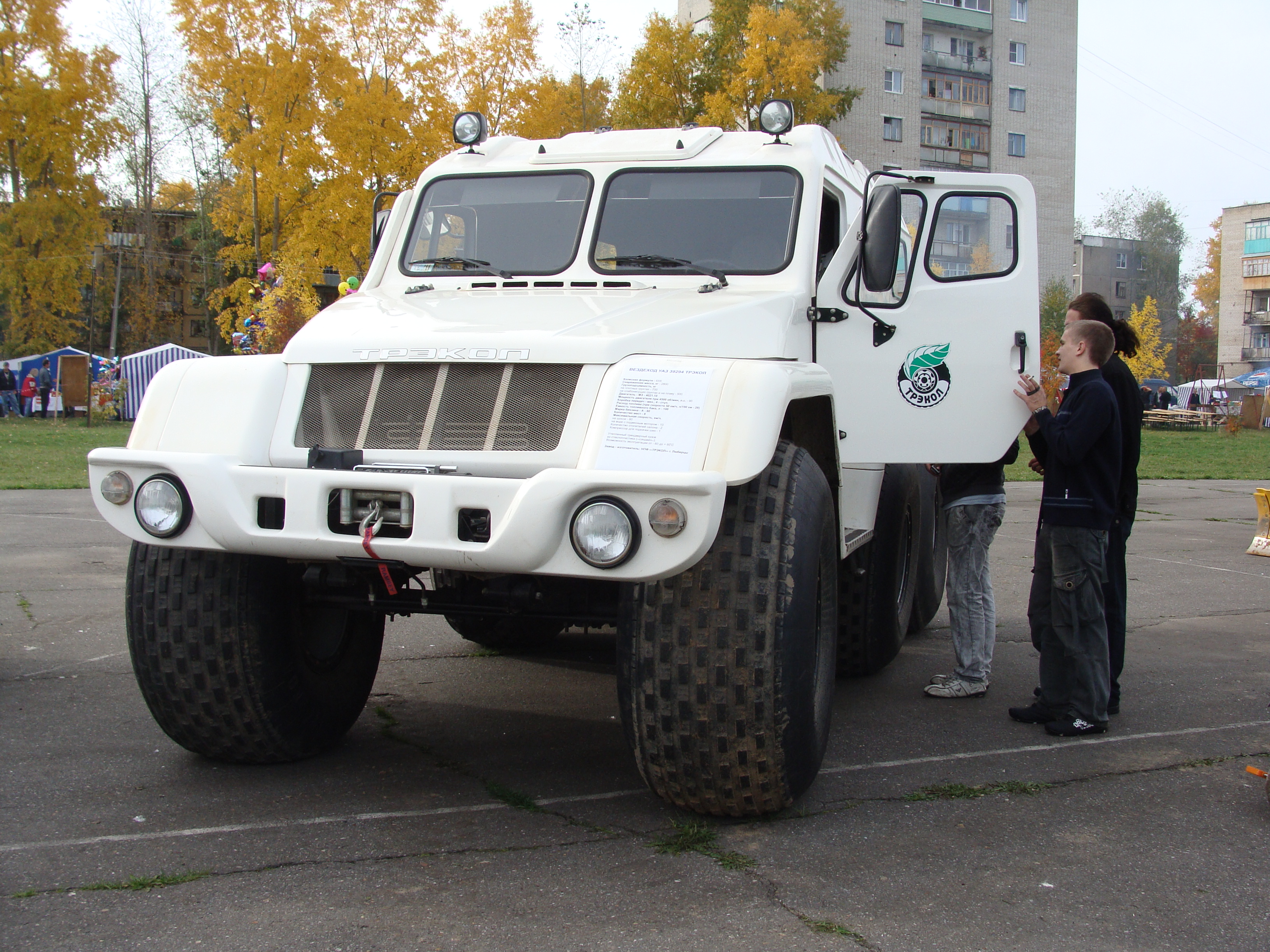 День работников леса. Коряжма 2010